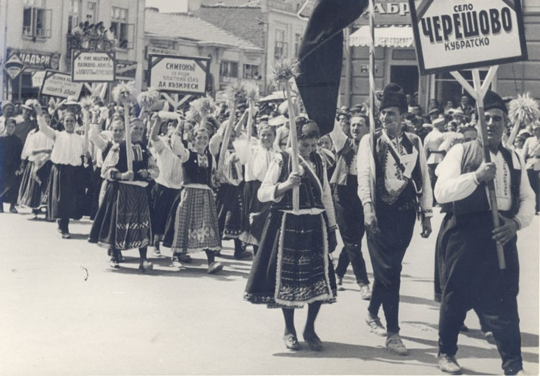 4-ти селскостопански културен и национален събор, 28 - 29 август 1938 г., Варна. Парад на участниците в събора по ул. “Княз Борис І”. На преден план са представителите на с. Черешово, Кубратско.